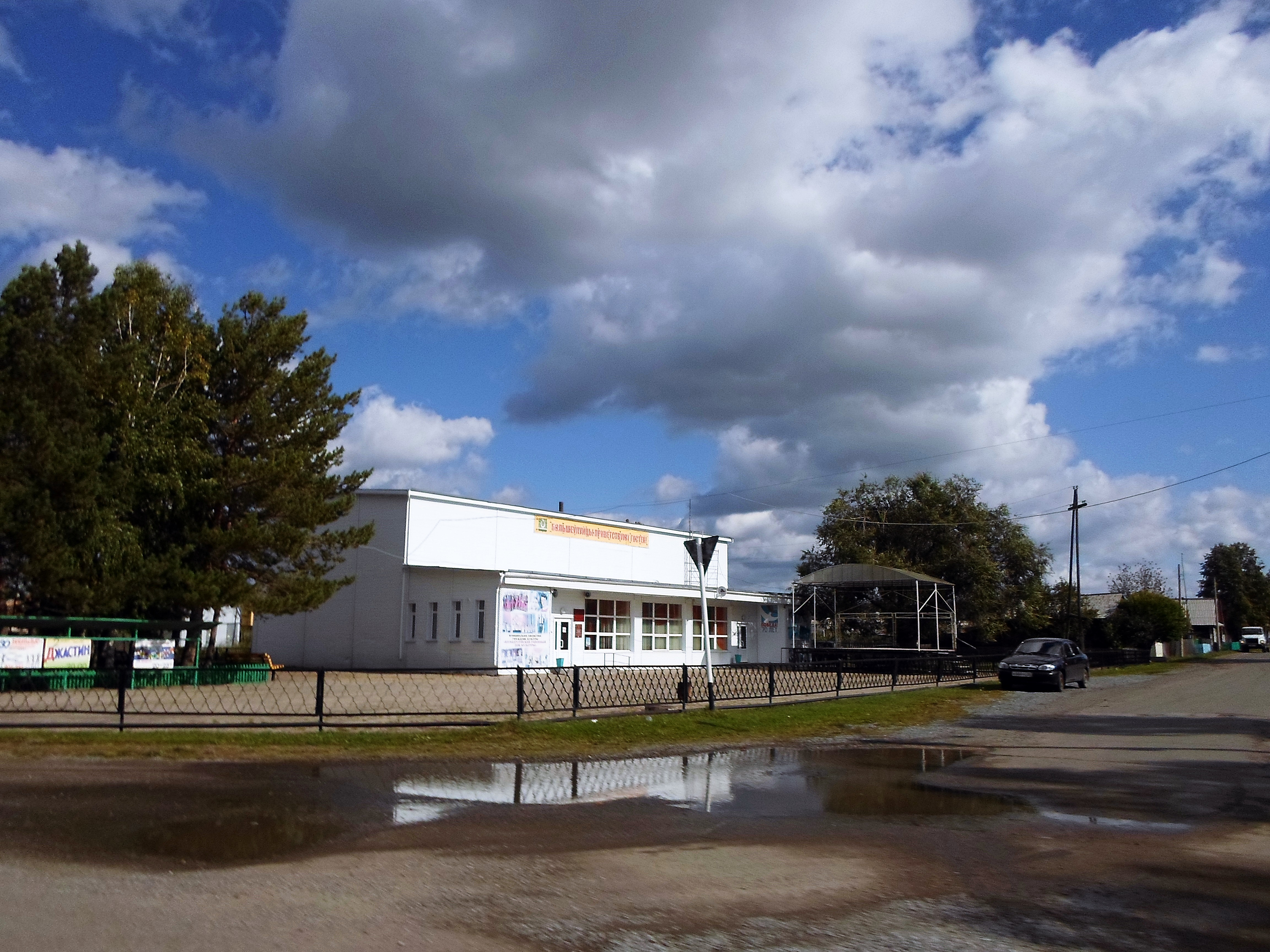 Село Большой Улуй Красноярского края. Дом культуры.